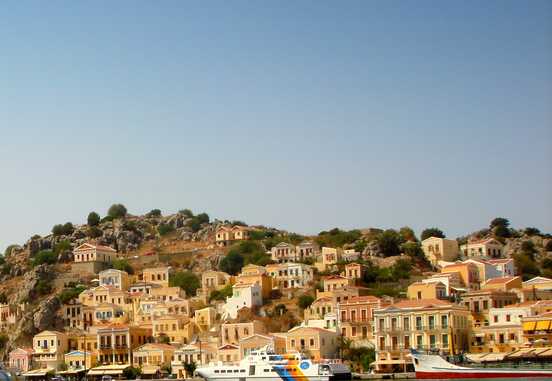 Grecja, Simi